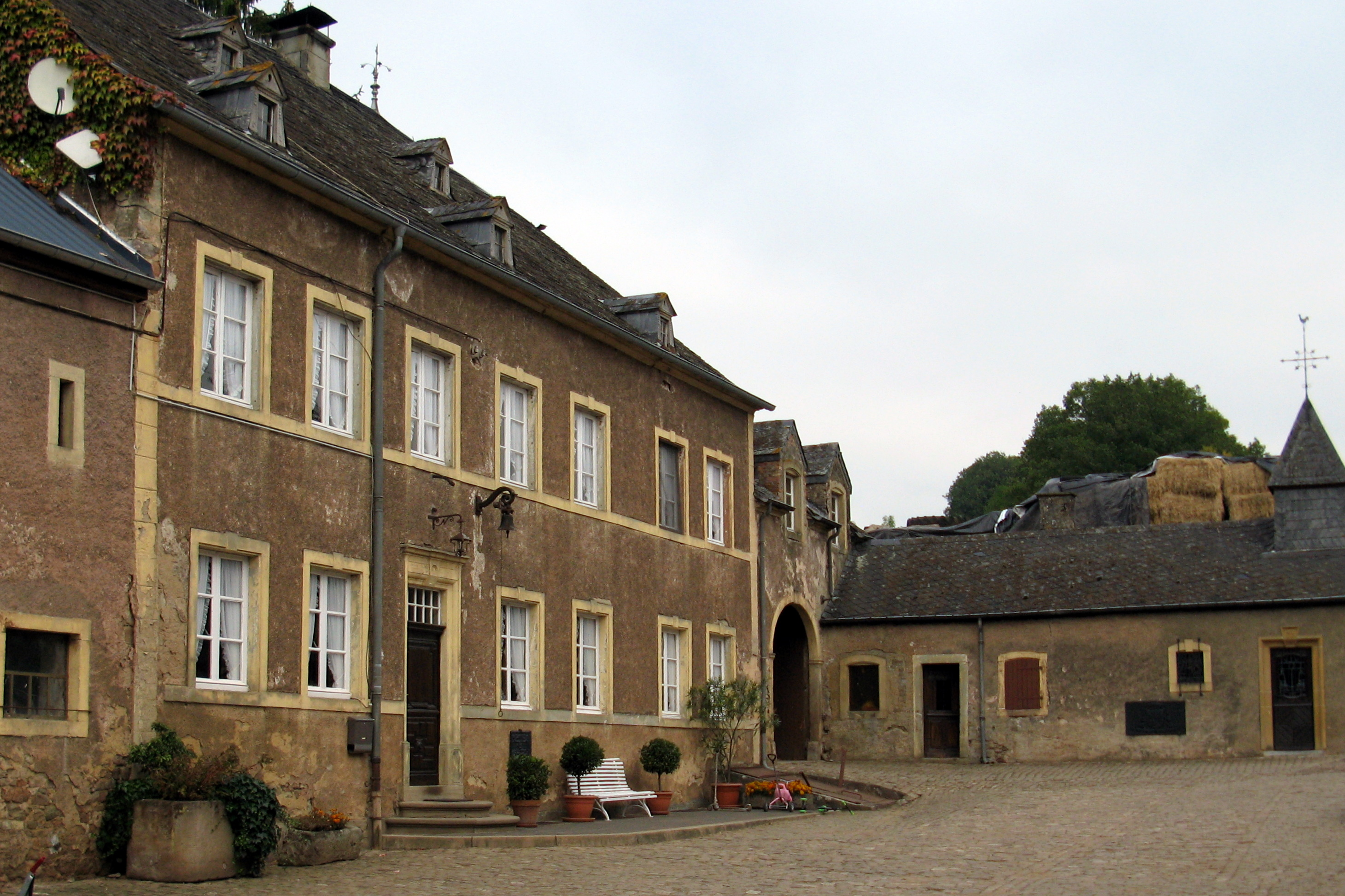 De Buerghaff am September 2009